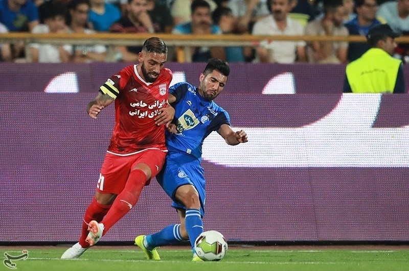 تیم‌های استقلال تهران و تراکتورسازی تبریز در هفته سوم رقابت‌های لیگ برتر فوتبال از ساعت ۲۰:۳۰ امروز (جمعه) ۱۹مرداد در ورزشگاه آزادی به مصاف هم رفتند که این دیدار با نتیجه ۳ بر صفر به سود استقلال خاتمه یافت.شاگردان شفر با کسب این پیروزی به اولین برد فصل خود در لیگ هجدهم رسیدند و با ۵ امتیاز به رده چهارم جدول صعود کردند. تراکتورسازی نیز با ۲ امتیاز در رده پانزدهم جدول ایستاد. گل‌های این بازی توسط علی عبدالله‌زاده (۱۳ -گل به خودی)، مرتضی تبریزی (۲۸) و فرشید اسماعیلی (۵۲) وارد دروازه تراکتورسازی شد.